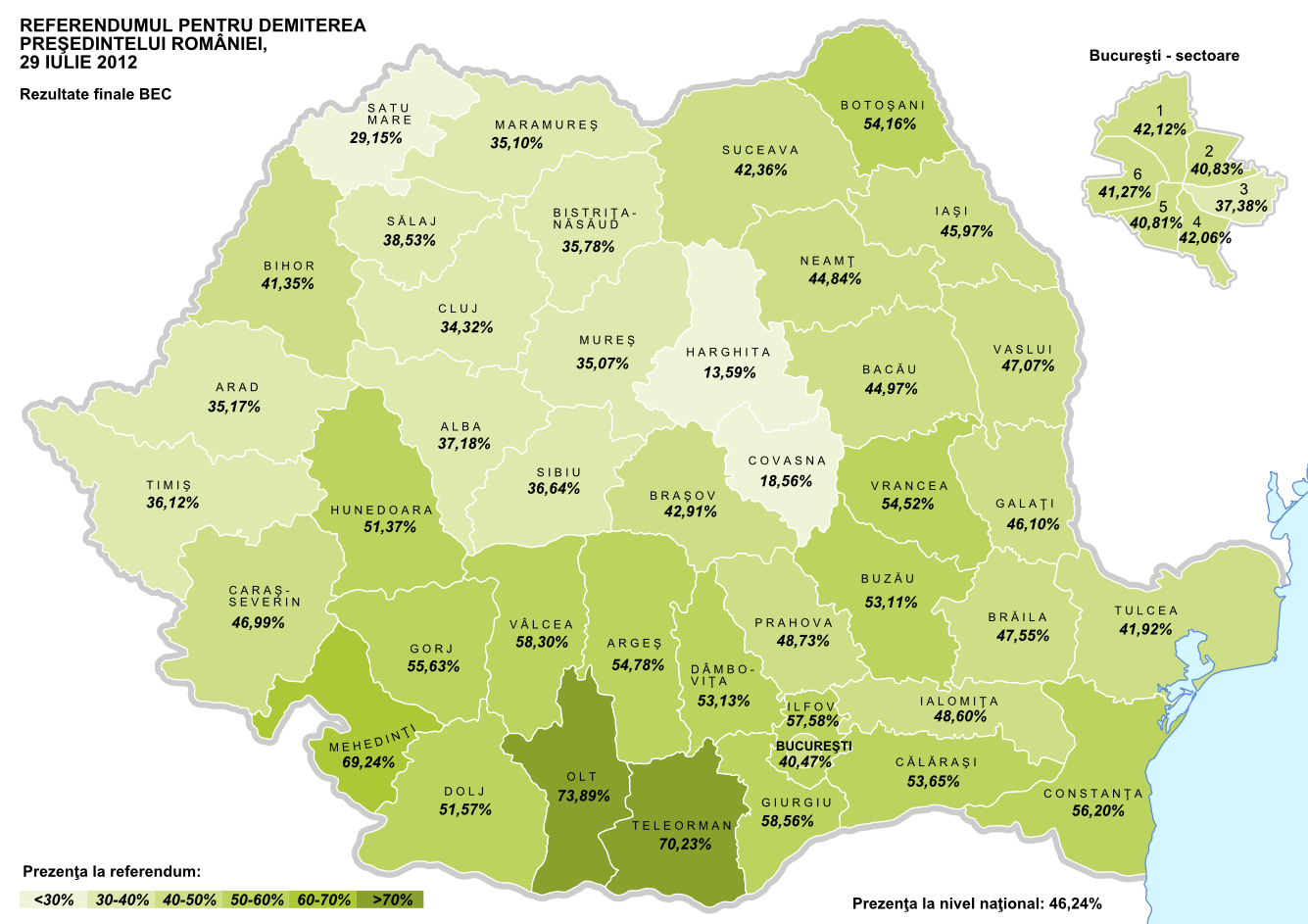 Harta prezentei la vot la referendumul pentru demiterea presedintelui Romaniei din 29 iulie 2012.